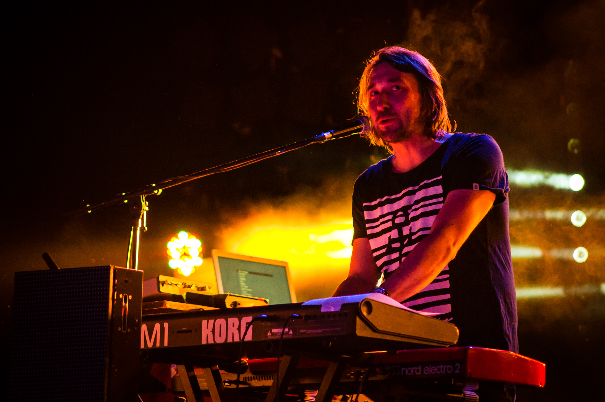 Marcin Zabrocki, klawiszowiec zespołu Hey podczas Rocket Festiwal 2013 w Warszawie.